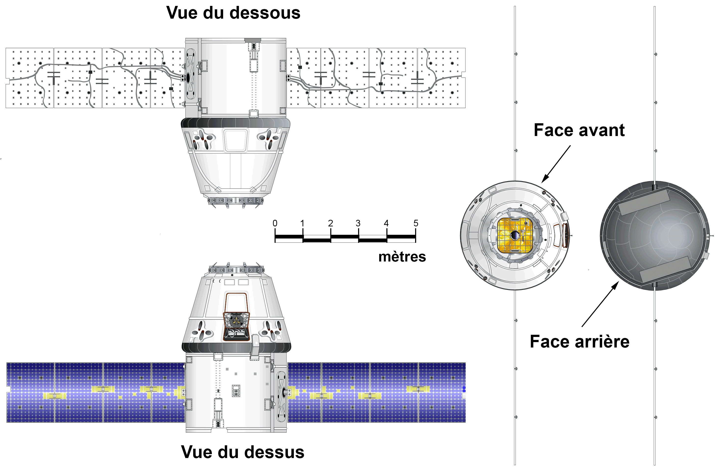 Schémas du vaisseau cargo SpaceX Dragon, légendes en français